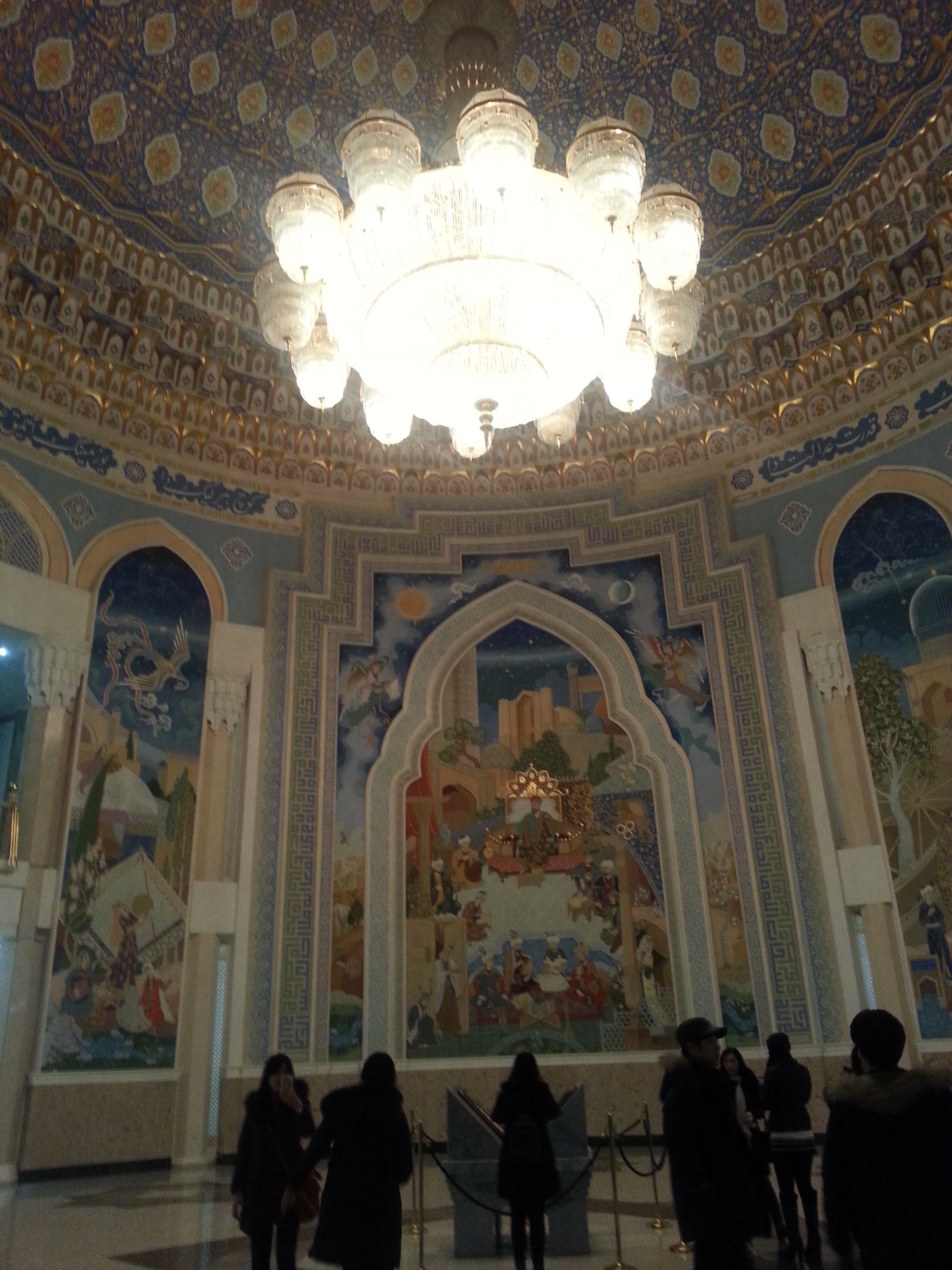 Музей Истории Тумуридов. Ташкент